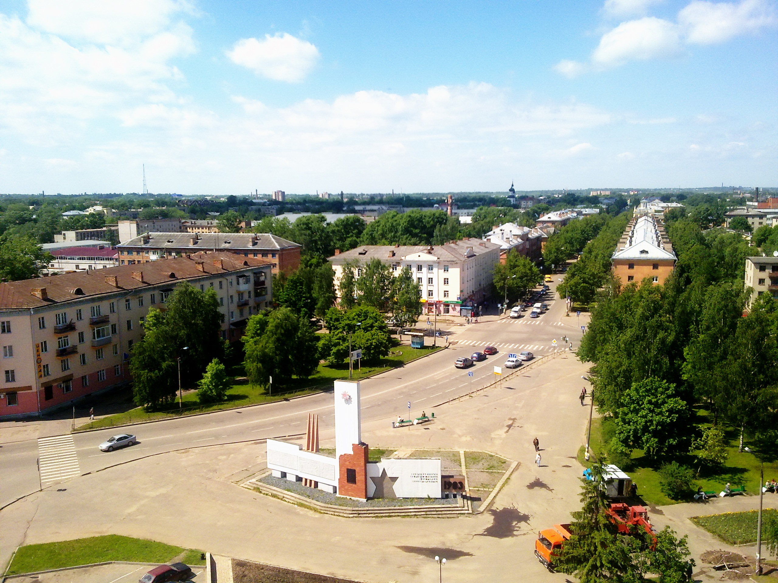 Площадь Калинина (г. Великие Луки)